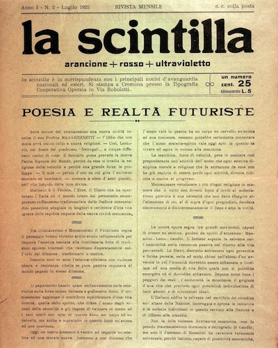 Frontespizio de "La Scintilla", n° 2 / 1925, periodico futurista diretto da Enzo Mainardi